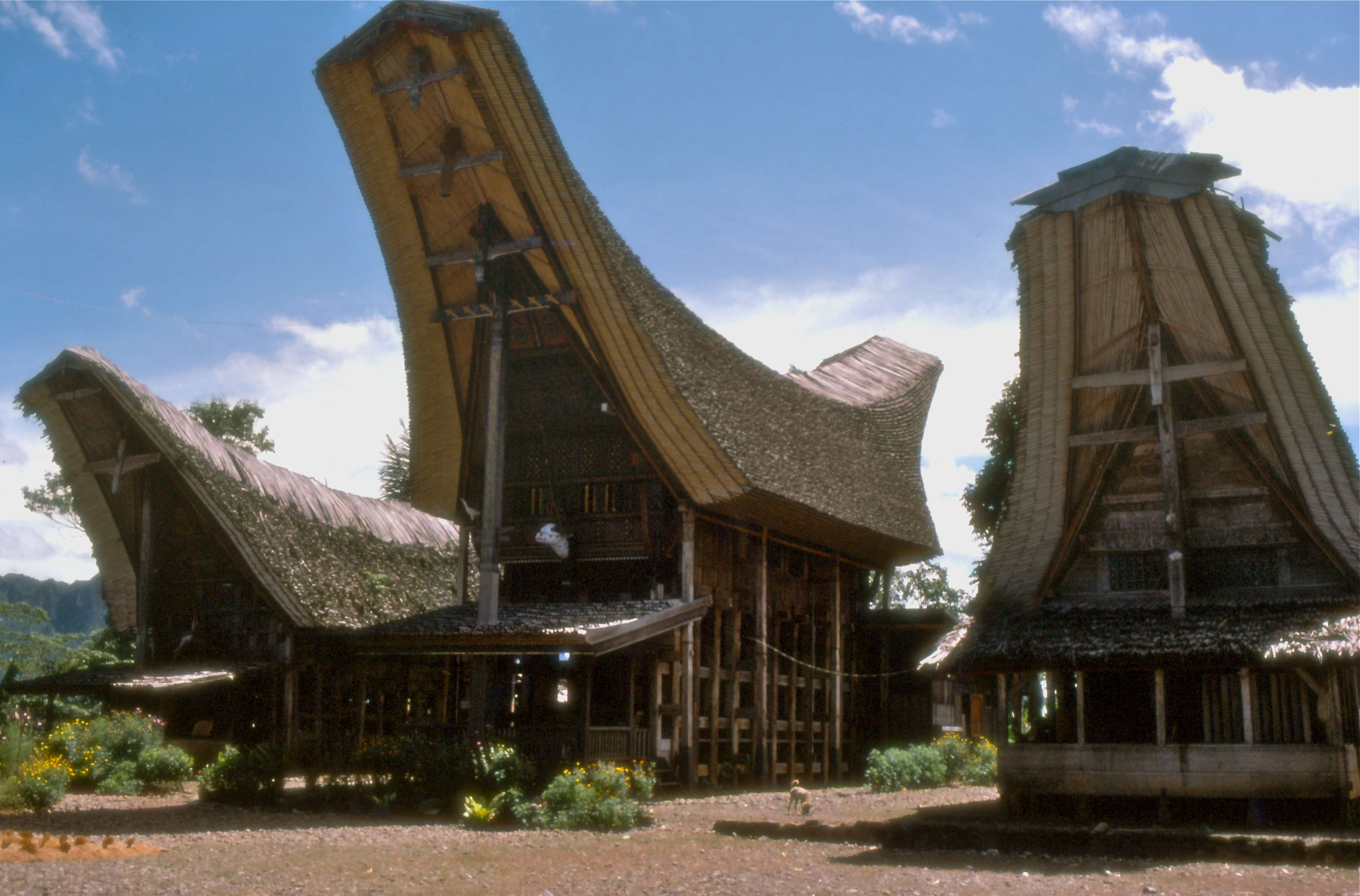 house, Tongkonan Maisons typiques Toraja Dominique Kirsner 1976 Olympus OM2